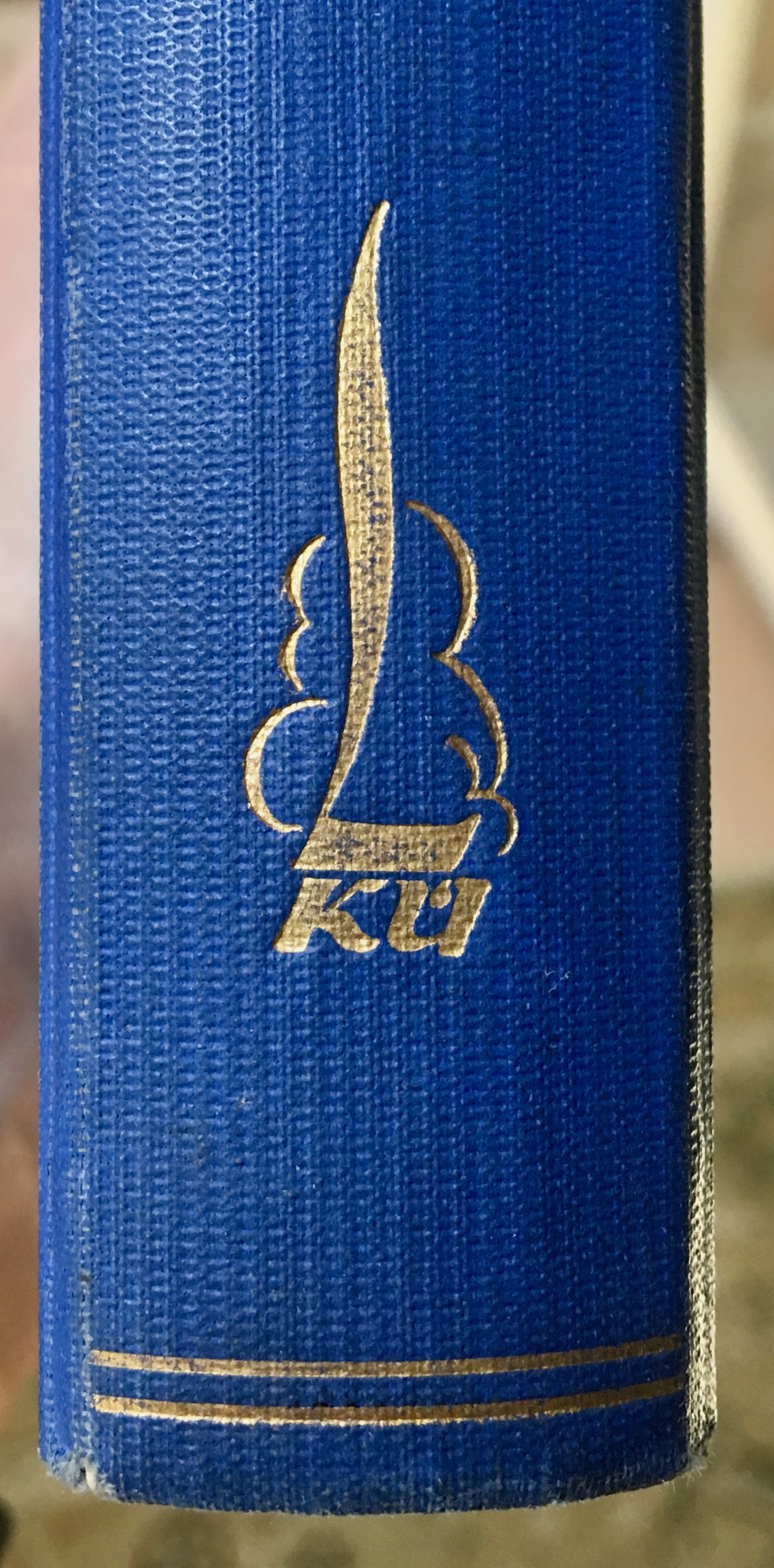 Looduse embleem raamatu seljal